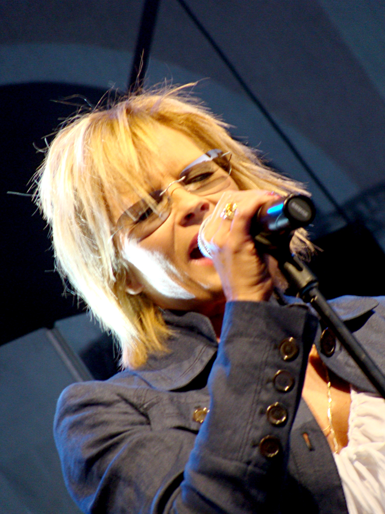 Urszula